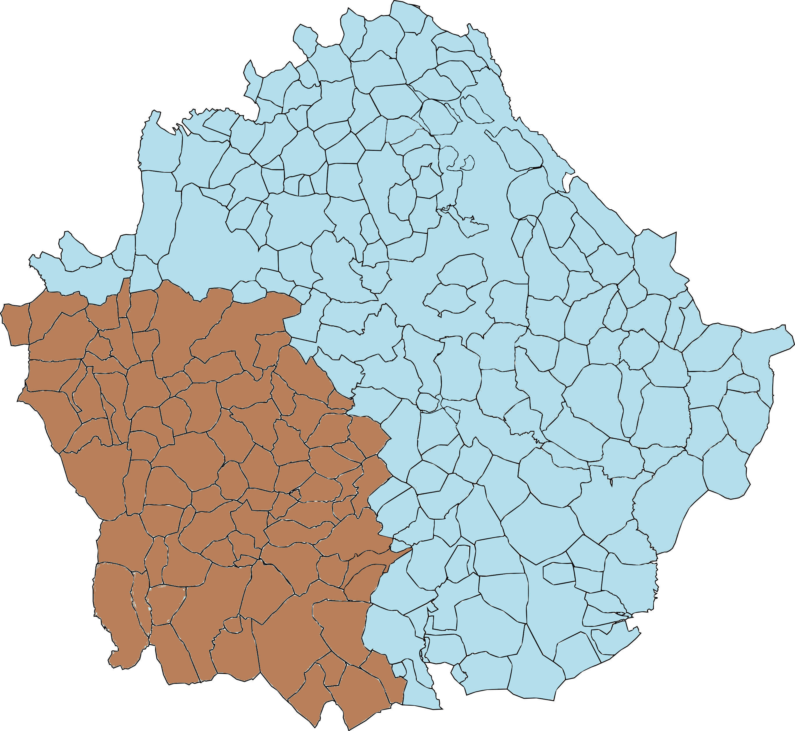 Comarca ManchaConquense